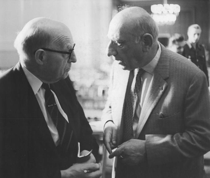 Oberstes Gericht, Globke-Prozess, Pitt, Nathan Zentralbild Stöhr-11.7.1963 1. Strafsenat setzte Verhandlung gegen Globke fort. Der 1. Strafsenat des Obersten Gerichts der DDR setzte am 11.7.1963 die Hauptverhandlung gegen den millionenfachen Judenmörder Globke fort. Im Mittelpunkt steht heute der Komplex der berüchtigten "Endlösung der Judenfrage". Wie am Vortage sagten zahlreiche Zeugen aus, die die faschistische Judenverfolgung am eigenen Leibe erlebten. UBz: Kronanwalt Pritt aus England (links) im Gespräch mit Prof. Dr. Nathan von der Juristischen Fakultät der Berliner Humboldt-Universität.